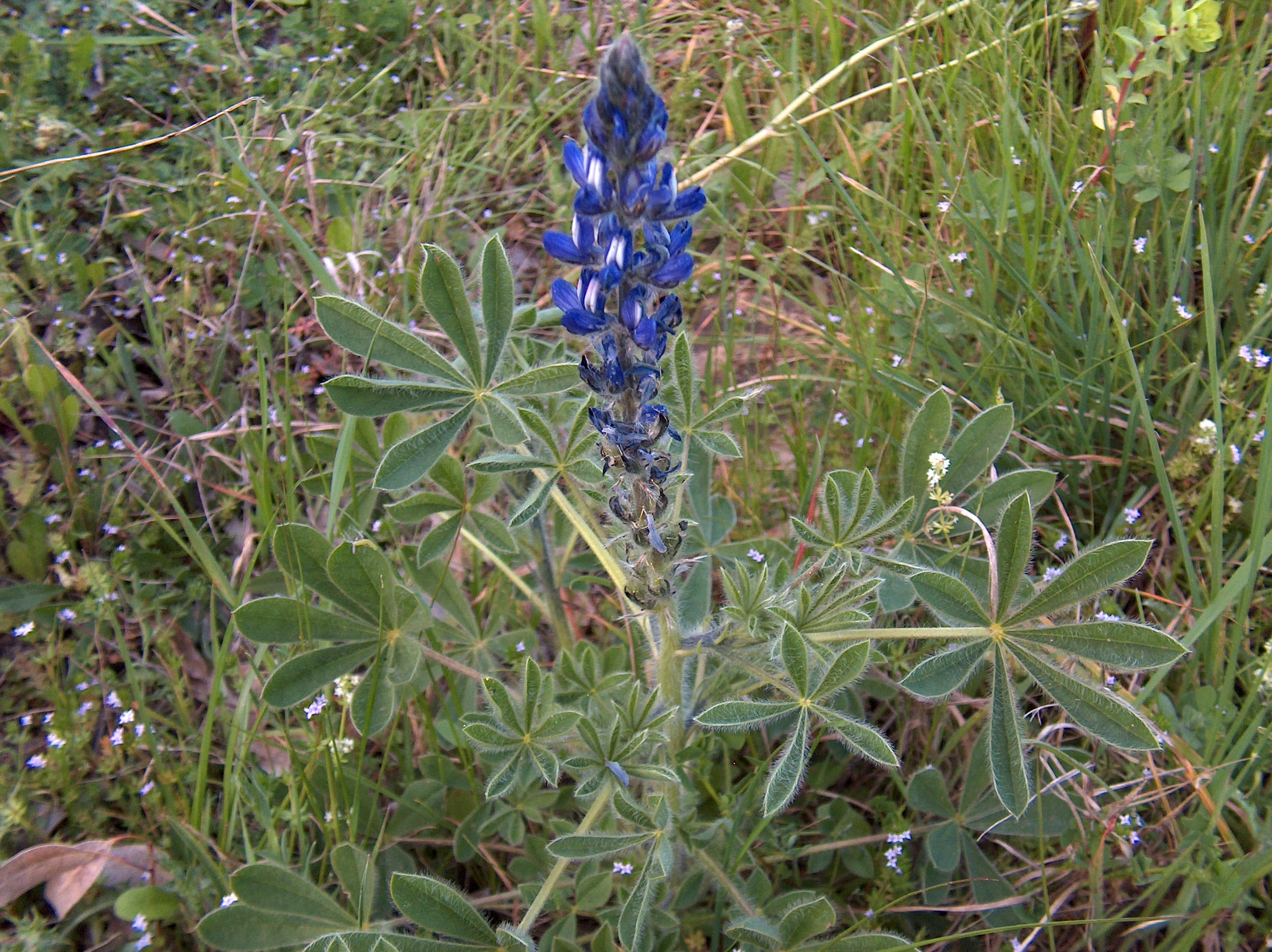 Lupinus pilosus (syn. Lupinus hirsutus). Place: Villacidro (Sardinia, Italy).